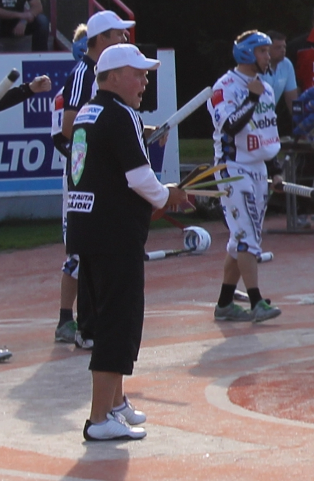 Nurmon Jymyn pelinjohtaja Antti Piuhola kaudella 2012